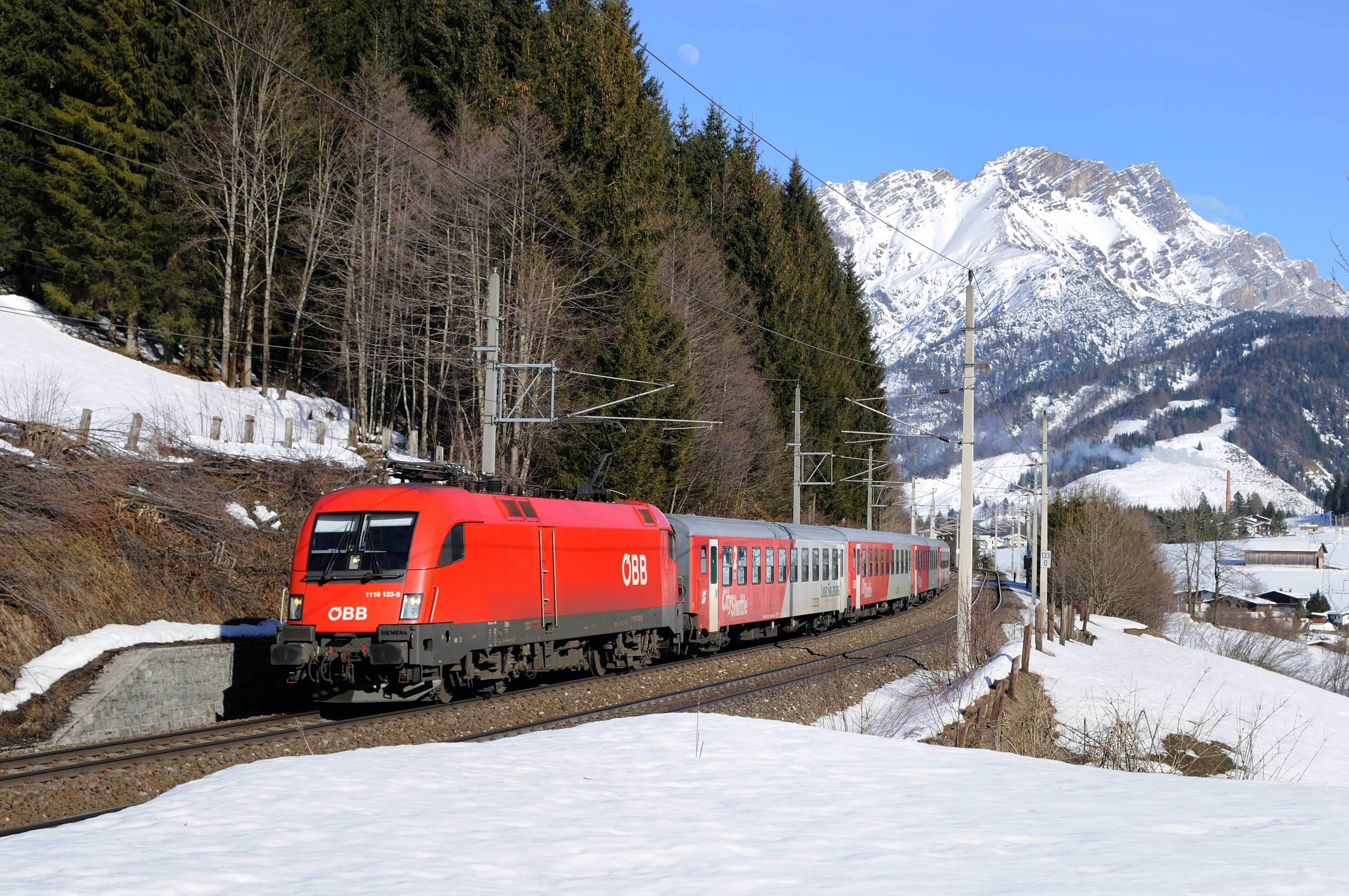 1116 133 mit dem R 1506 kurz vor Pfaffenschwendt. Im Hingergrund die Leoganger Steinberge.